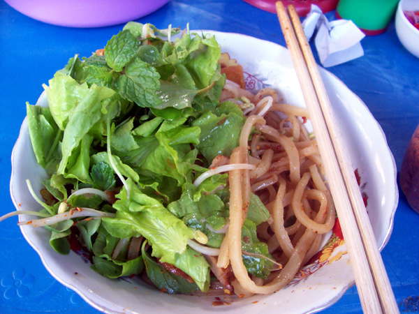 A bowl of cao lầu in Hoi An.